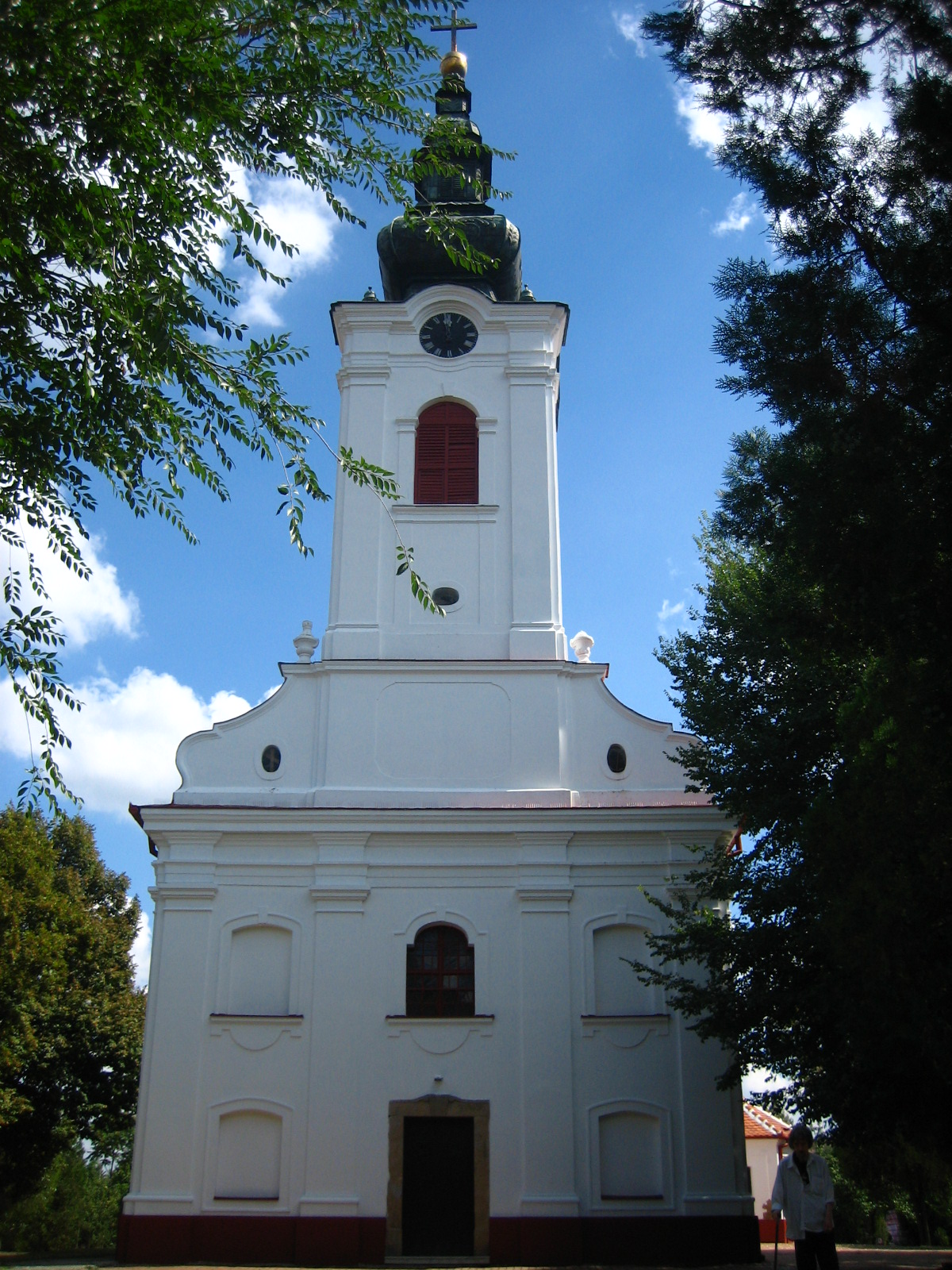 Предњи изглед зграде цркве